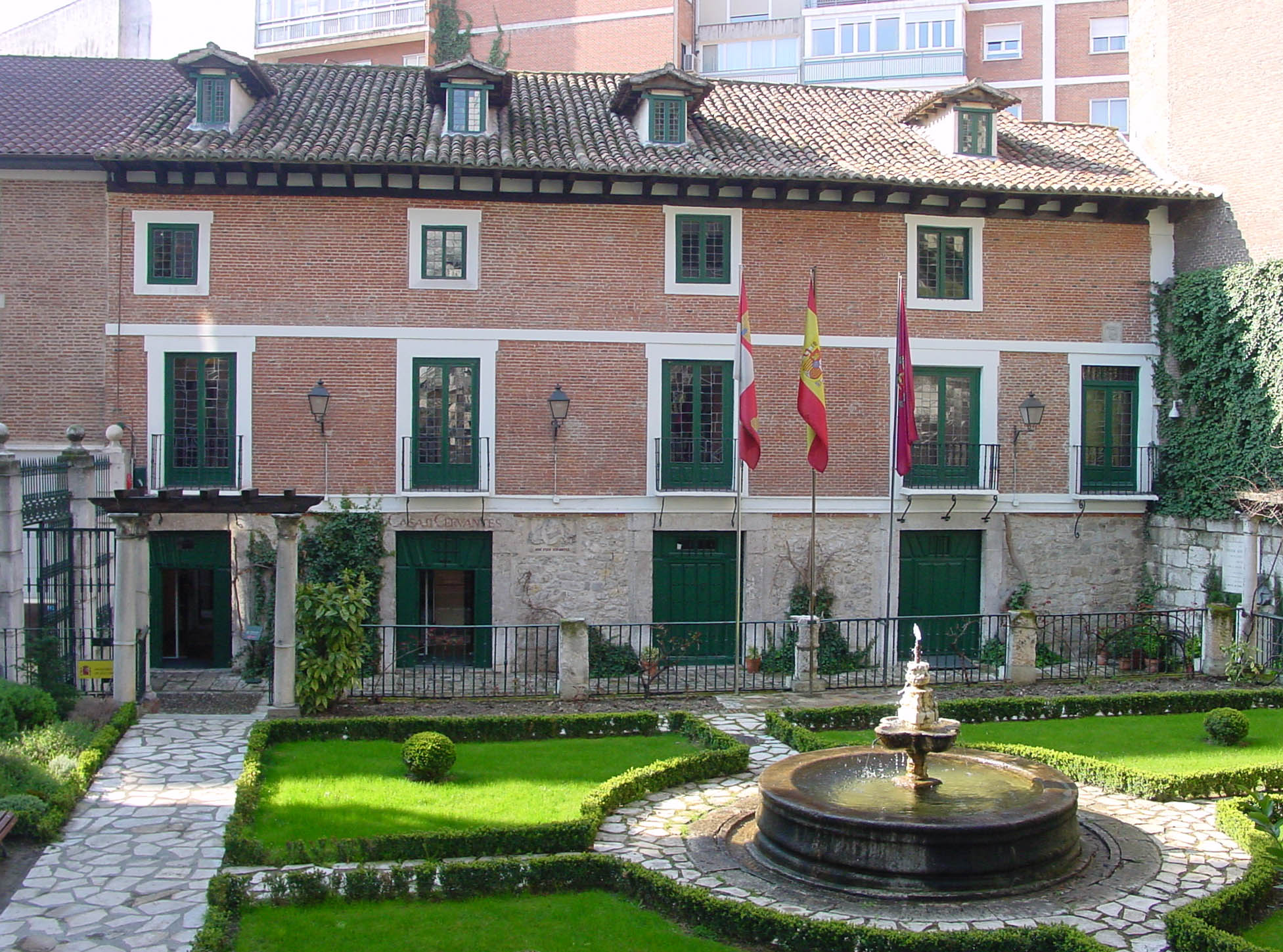 Casa de Cervantes en Valladolid (España). La puerta de la derecha pertenece a la Academia de Bellas Artes